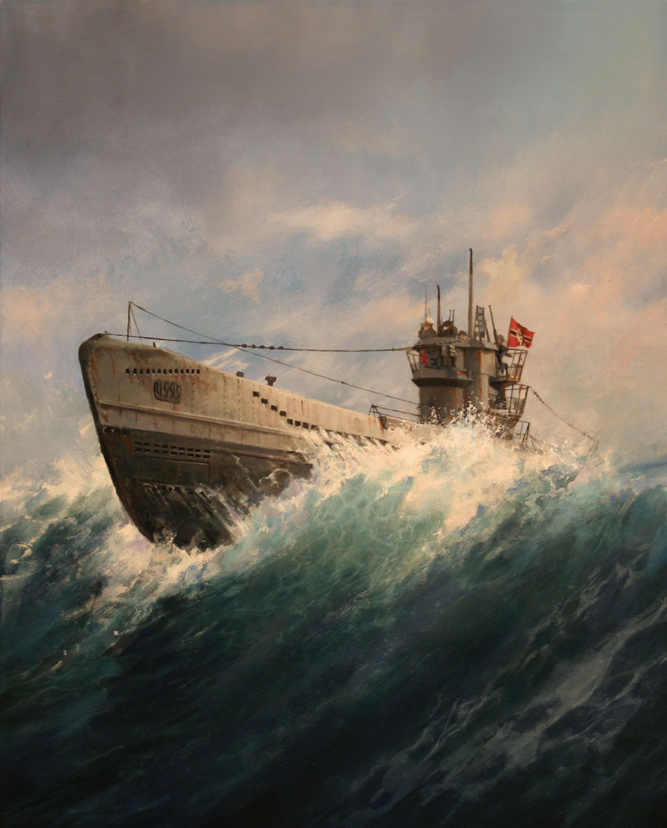 U-boot by Ferrer-Dalmau 2002